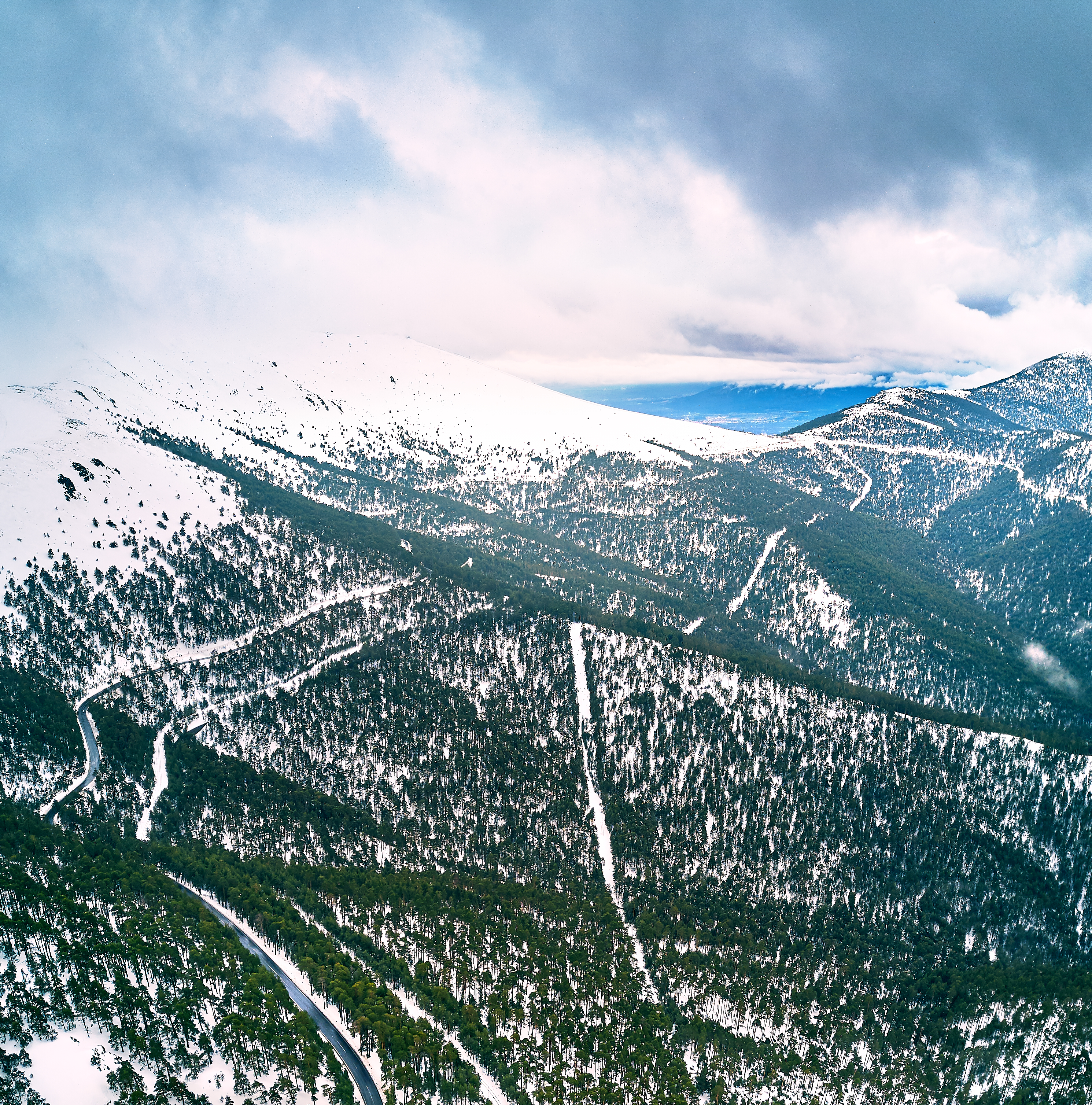 Sierra de Guadarrama, carretera SG-615.